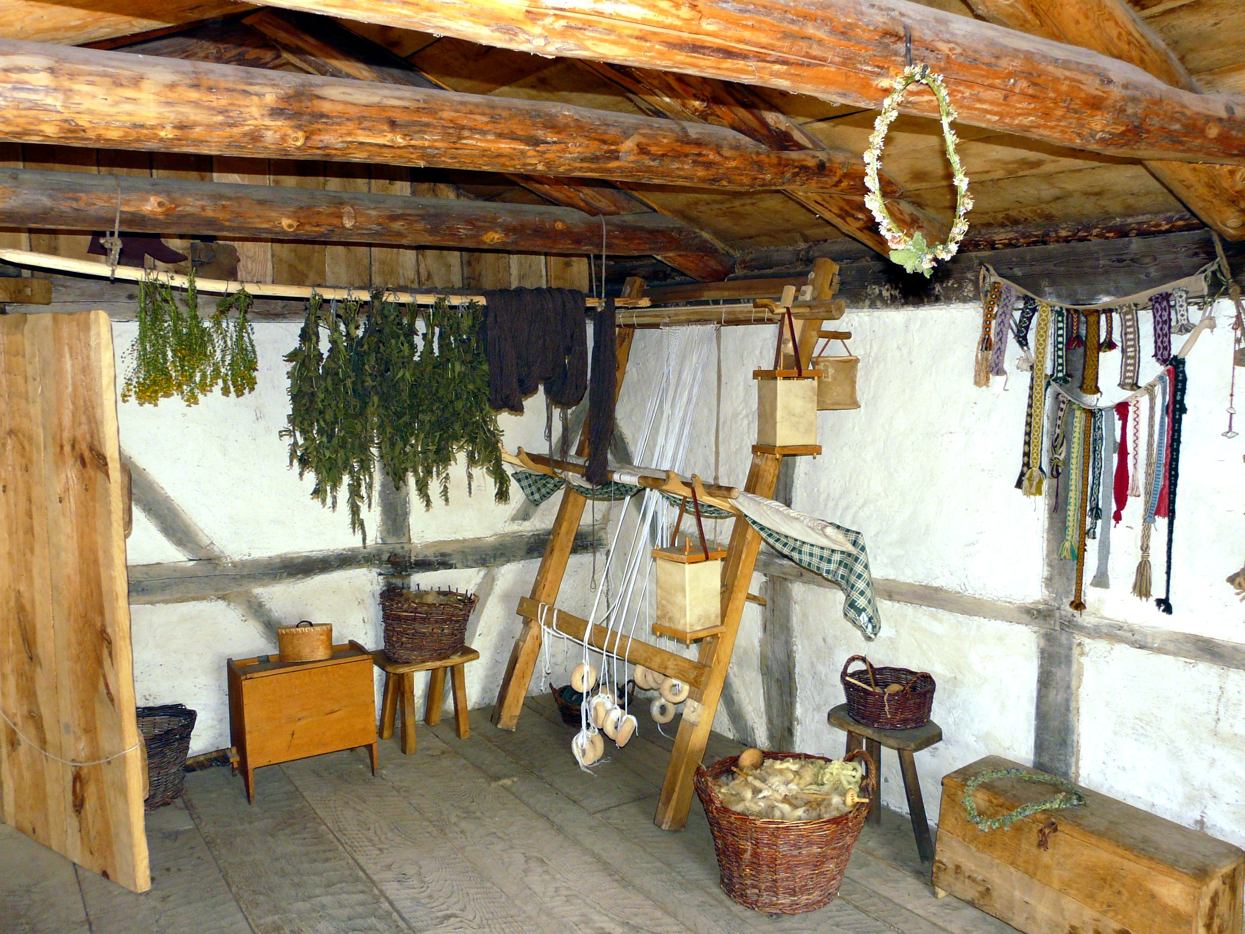 Innenraum eines der Häuser im "Vikingareservat Foteviken" (Höllviken, Schweden)